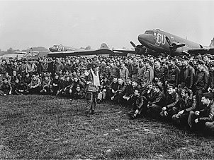 Discurso a los soldados antes de montar en los aviones y saltar sobre Normandia